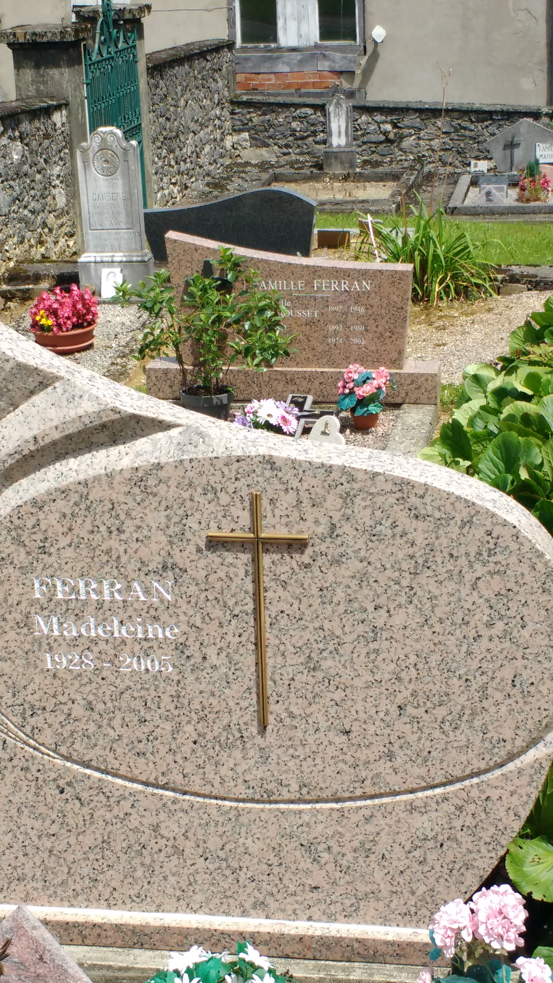 Lápidas de Ferran en Herran